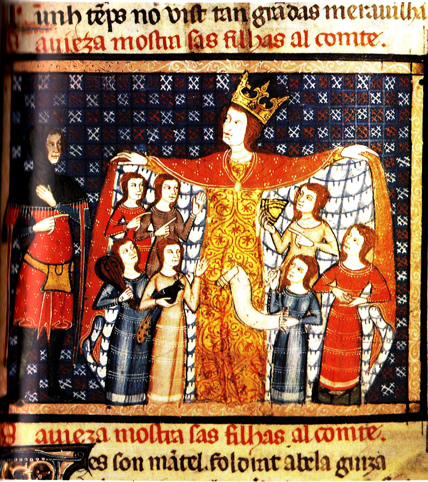 pages de l'Elucidari, siecle XIV, Bibliothe Sainte Genevieve, Paris